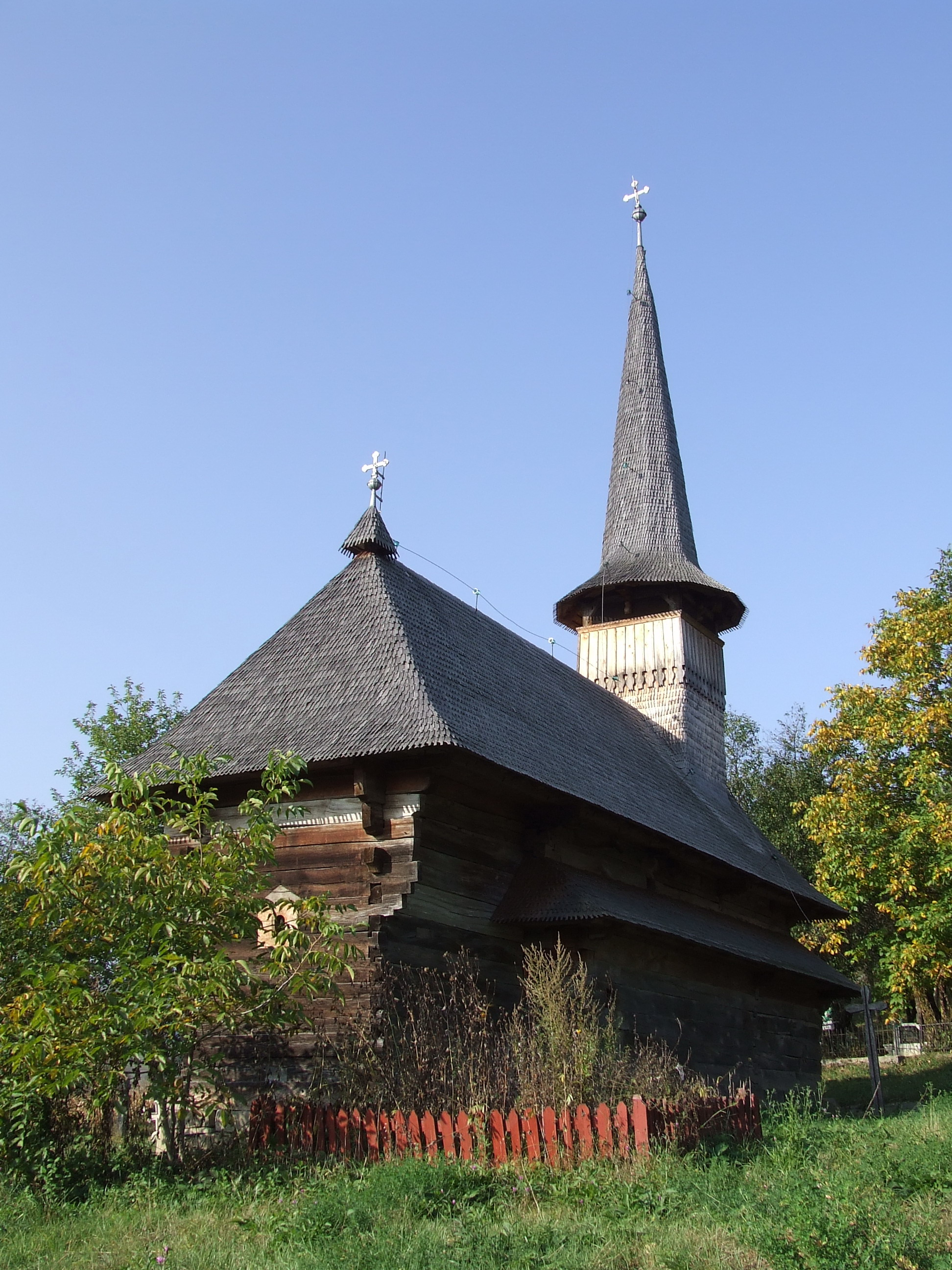 Biserica de lemn din Racâş, judeţul Sălaj. Pictură interioară.